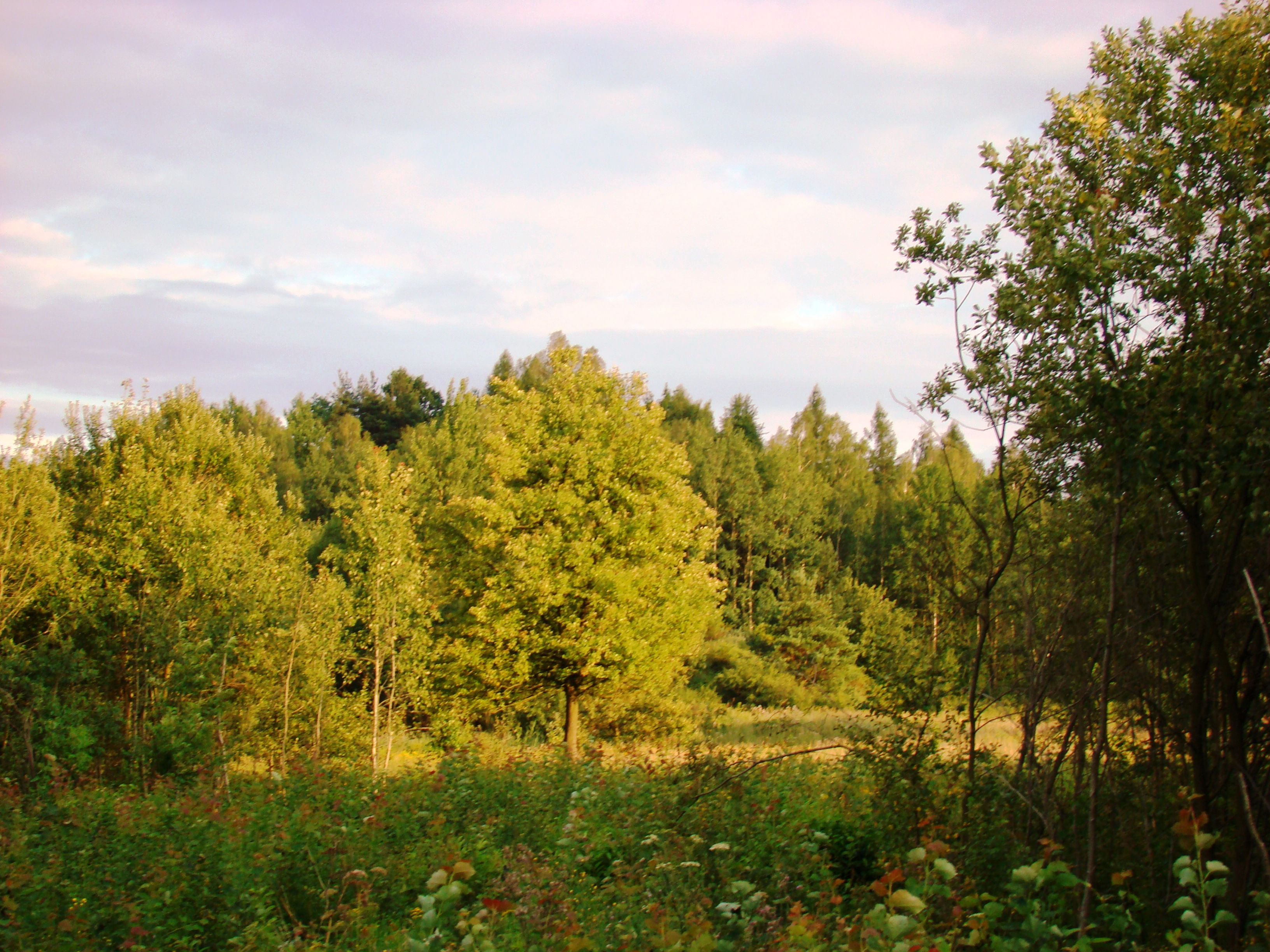 Hałda kopalni Paweł VI w Liszce Dolnej